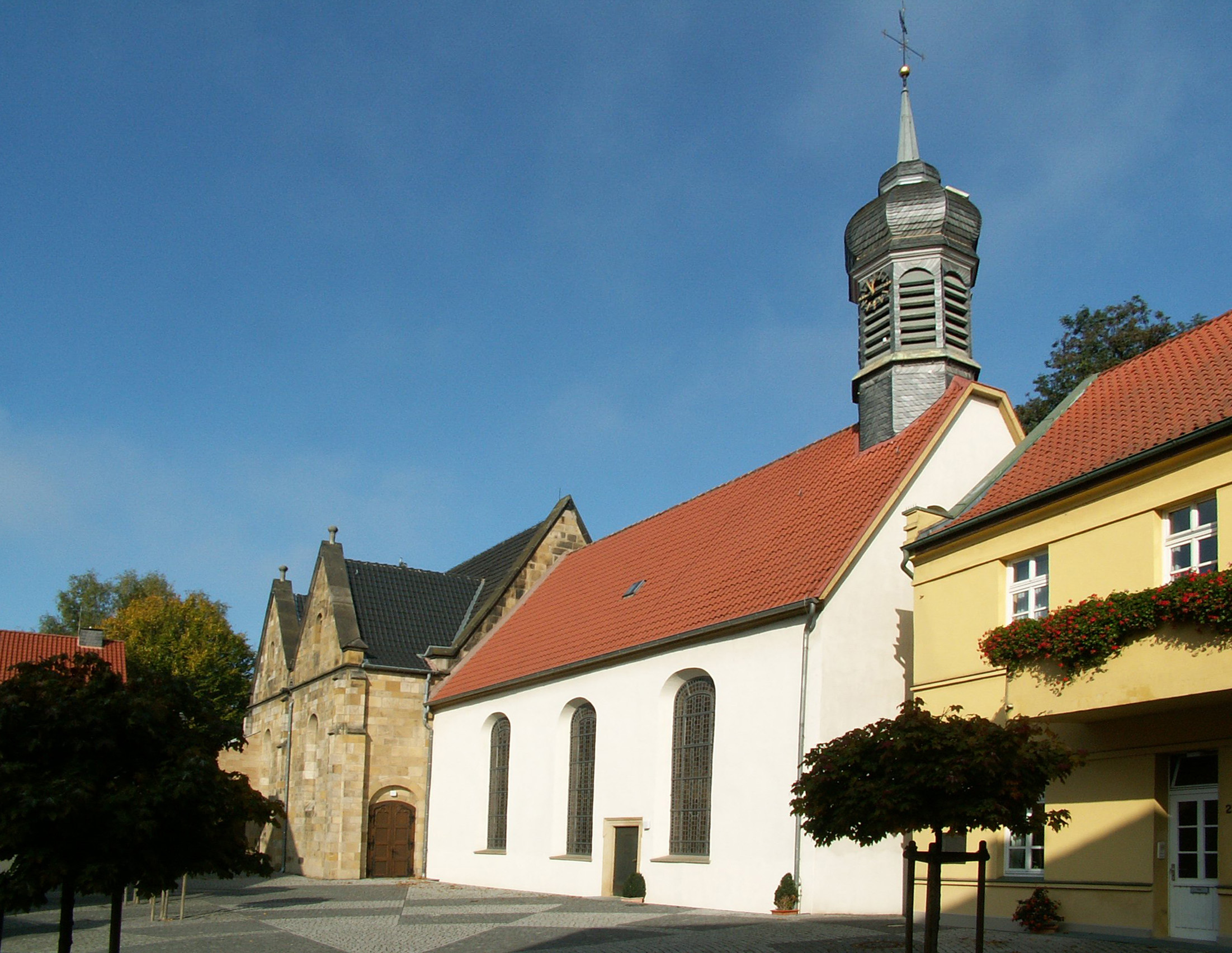 Katholische Kirche St. Johannes Baptist in Herford, Ansicht von Süden